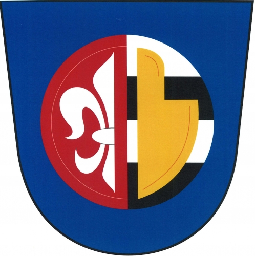 znak,Dobročkovice , okres Vyškov